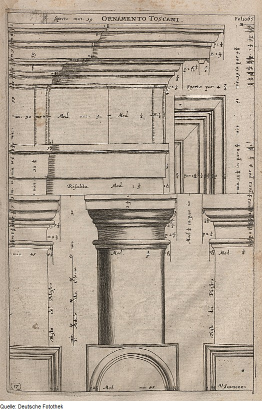 Original image description from the Deutsche Fotothek Architektur & Säule & Kapitell & Gebälk & Architrav & Fries & Gesims